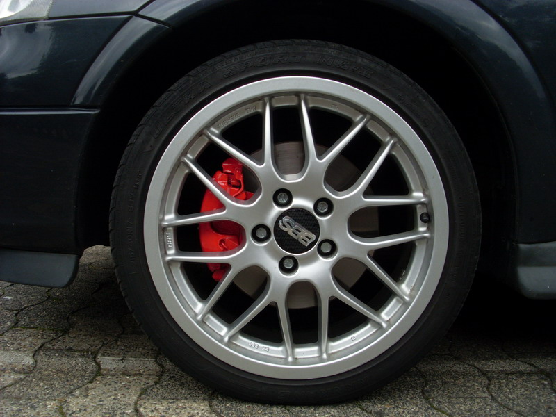 Autoreifen auf BBS Alufelge